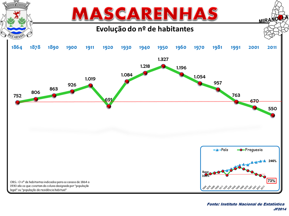 Evolução da População 1864 / 2011